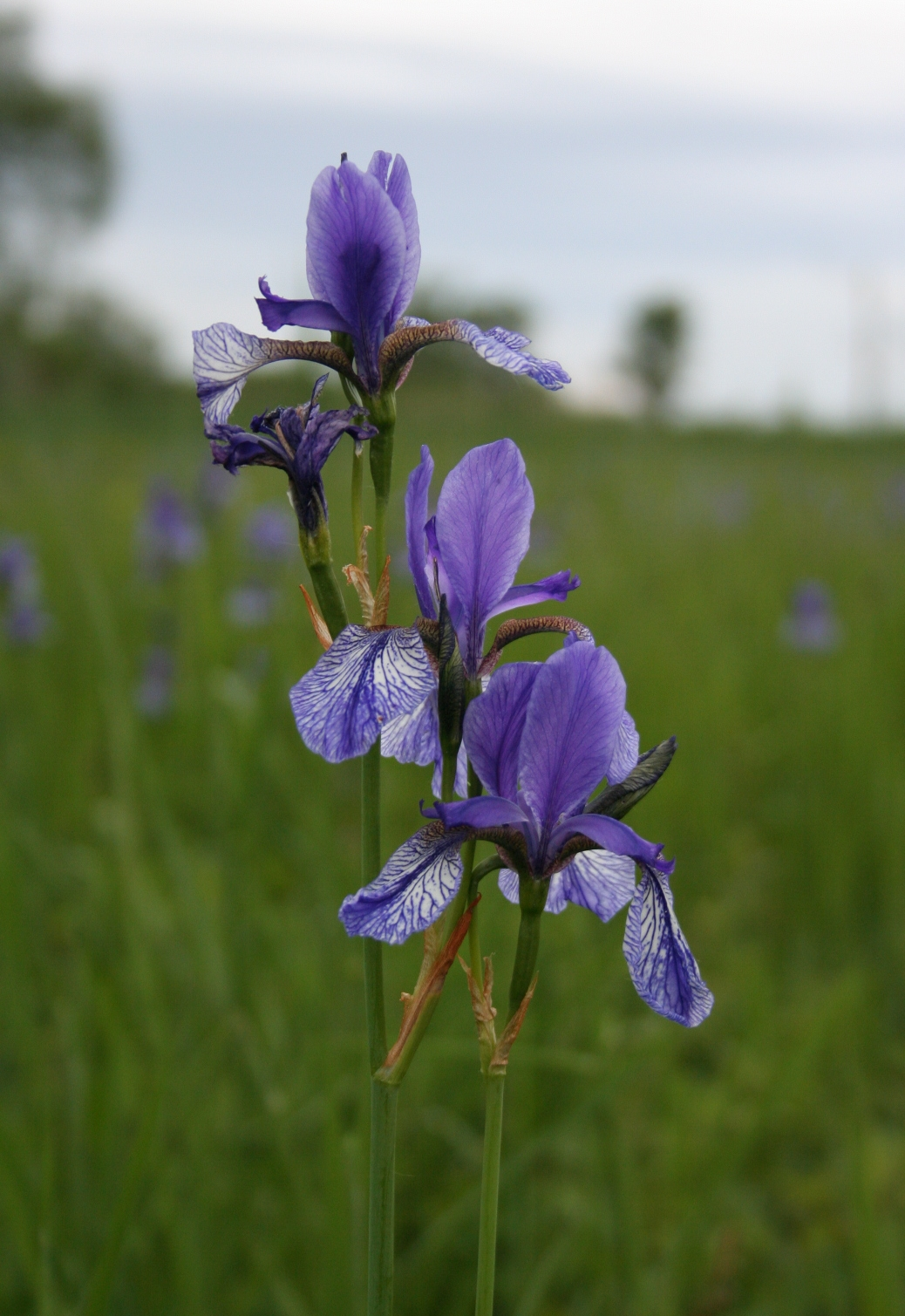 Sibirische Schwertlilie (Iris sibirica) in den Streuwiesen im "Eriskircher Ried" (als Naturschutzgebiet ausgewiesen seit 1939) in Eriskirch.